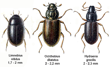 Hydraenidae Spec., Quelle: Reitter, E.: Fauna germanica, Bd.II, Stuttgart, 1909